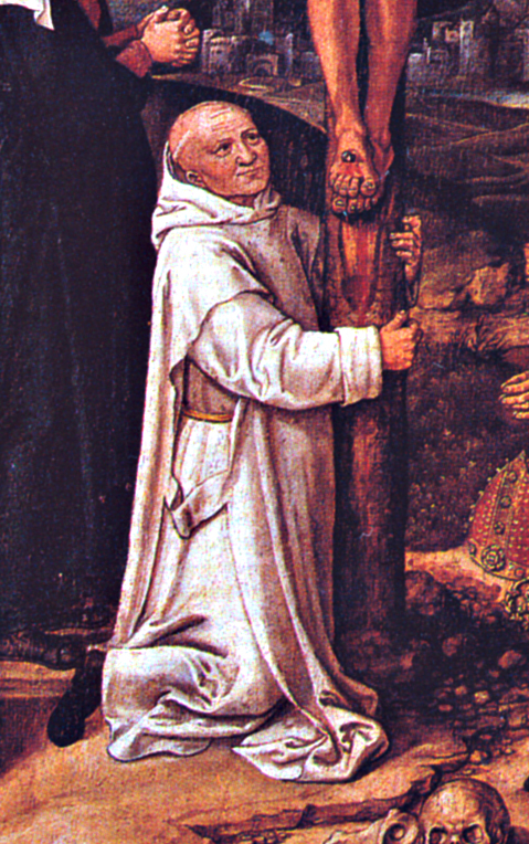 Anton Woensam, Christus am Kreuz, Köln 1535 – Ausschnitt mit Peter Blomevenna, Prior der Kartause Köln